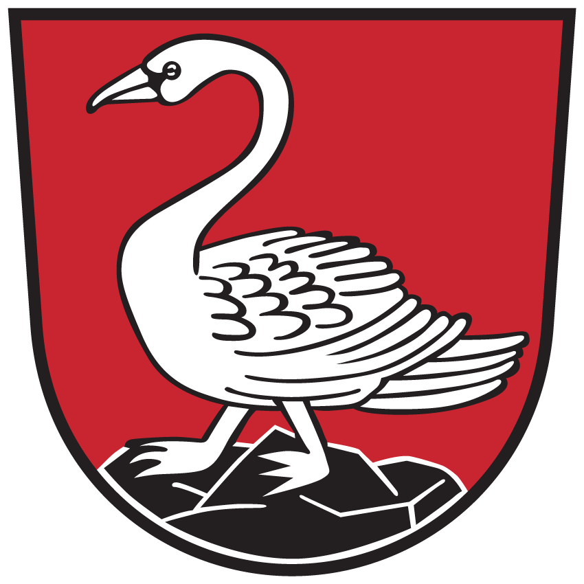 Wappen von Metnitz